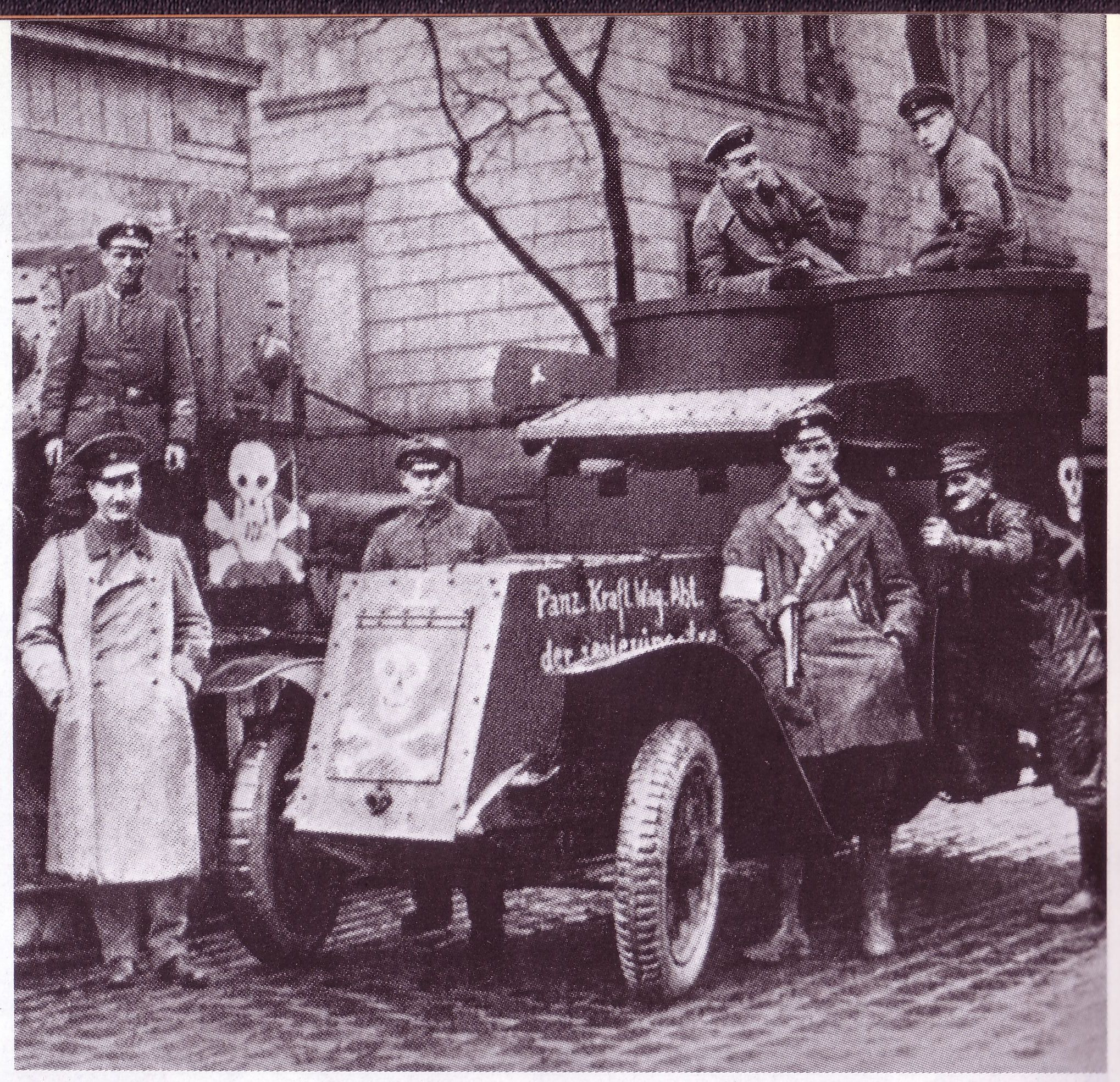 Белый немецкий контрреволюционный отряд, принимавший участие в подавлении революции 1918/19 г.г. в Германии, позирует на фоне бронеавтомобиля «Остин» II серии (британского), захваченного у Русской Императорской армии и применявшегося в составе германской броневой дивизии трофейной техники «Кокампф» в подавлении восстания спартакистов. На броневике эмблема "мёртвая голова" - череп и кости.